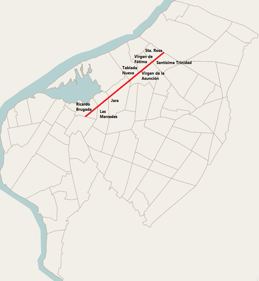 Mapa Av. General Artigas, Asunción, Paraguay